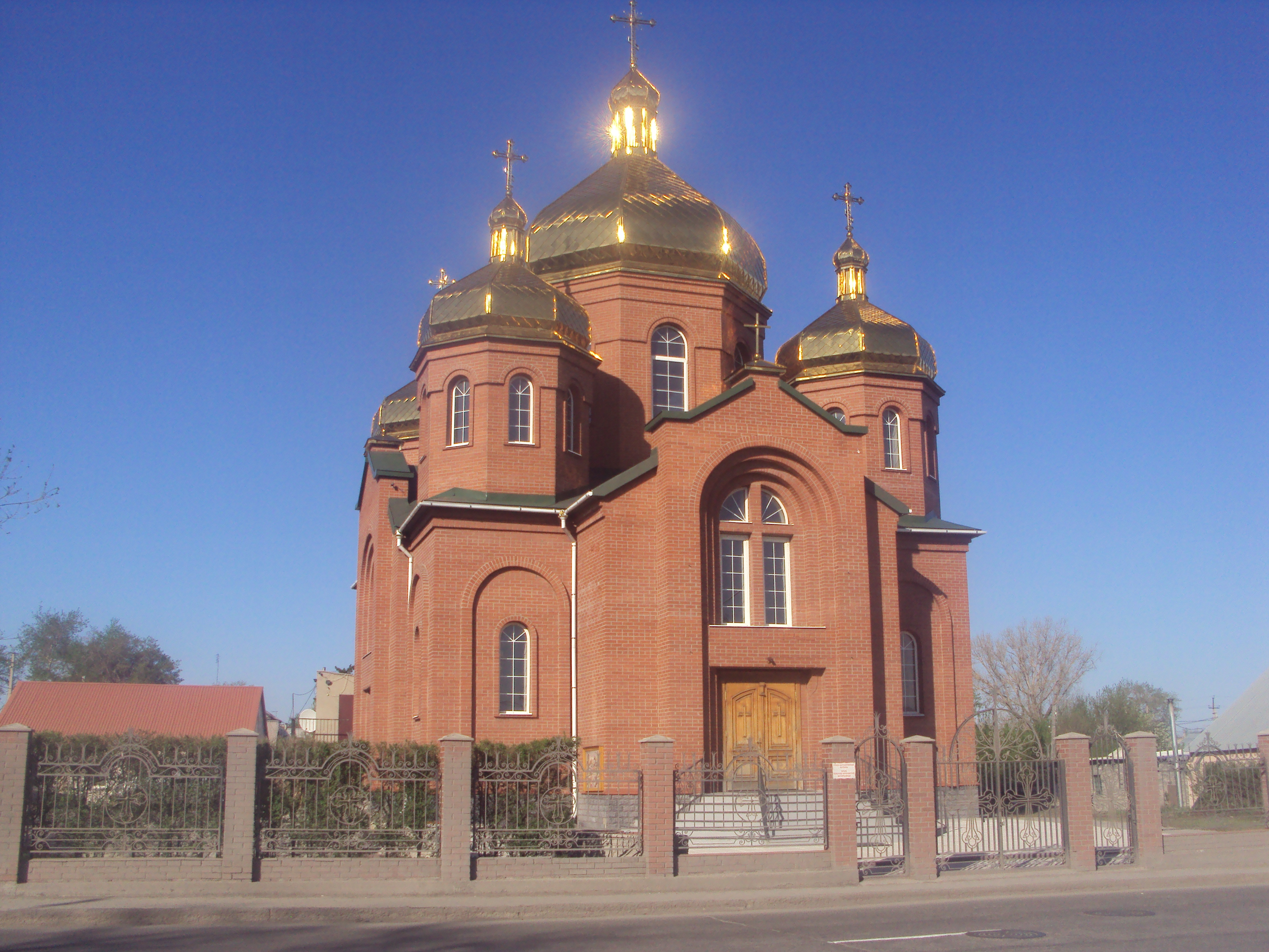 Греко-католическая церковь по улице Гоголя, Караганда.